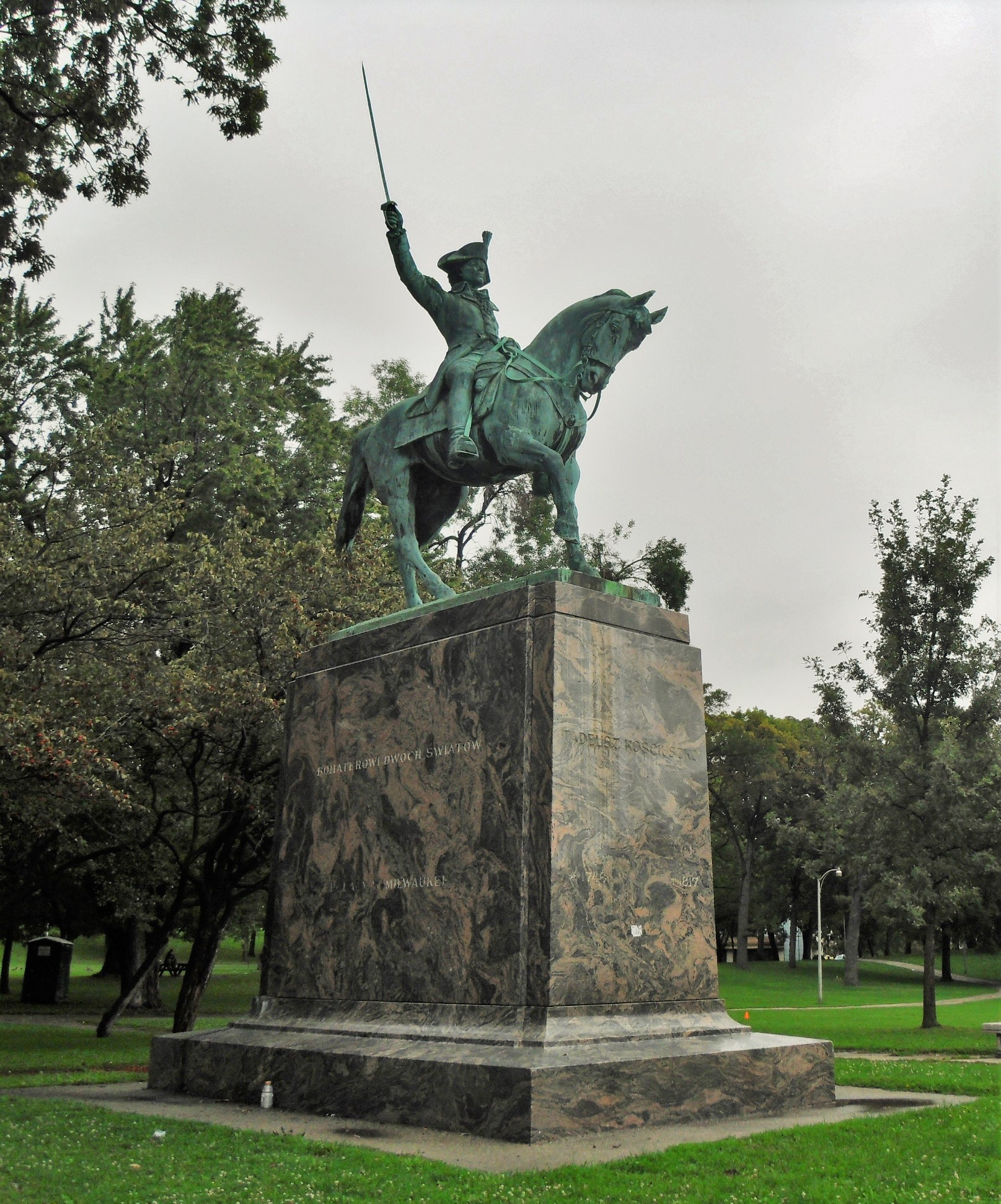 Памятник национальному герою Польши и США Тадеушу Костюшко в г.Милуоки в парке, носящем его имя.